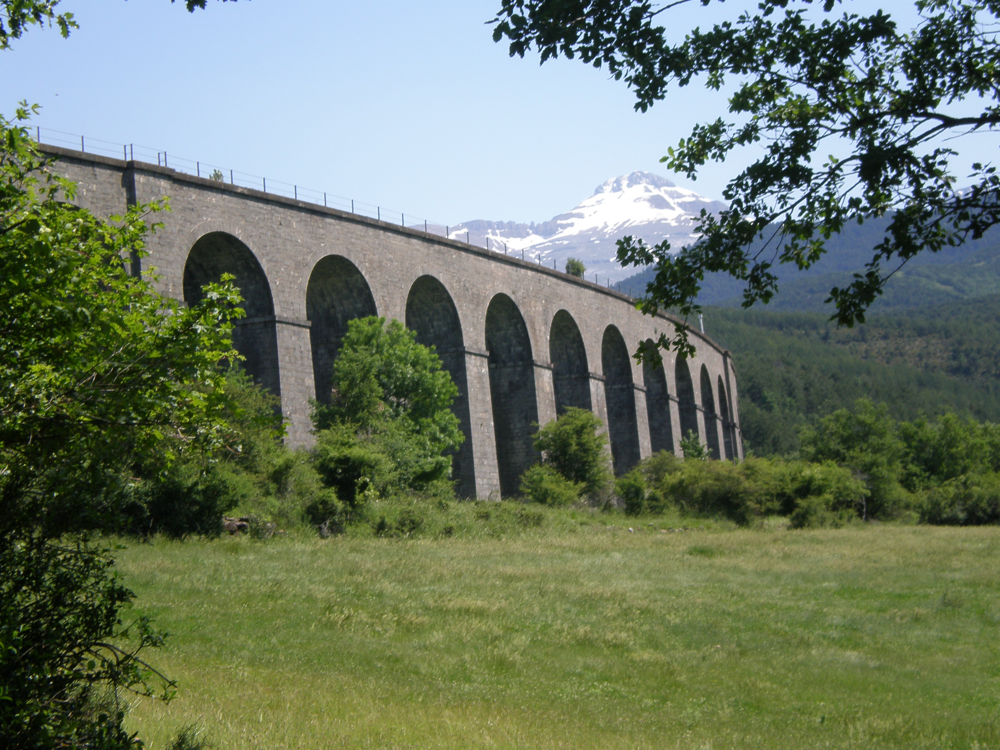 Imagen del viaducto de San Juan en Villanúa